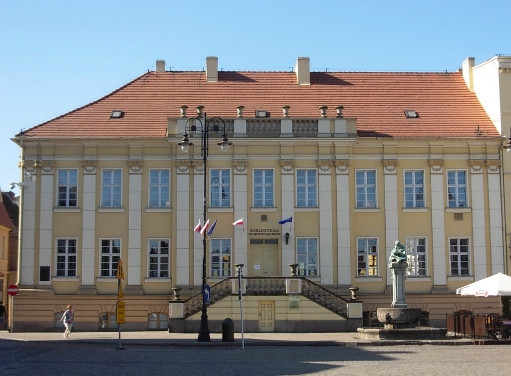 Biblioteka Miejska i Wojewódzka w Bydgoszczy